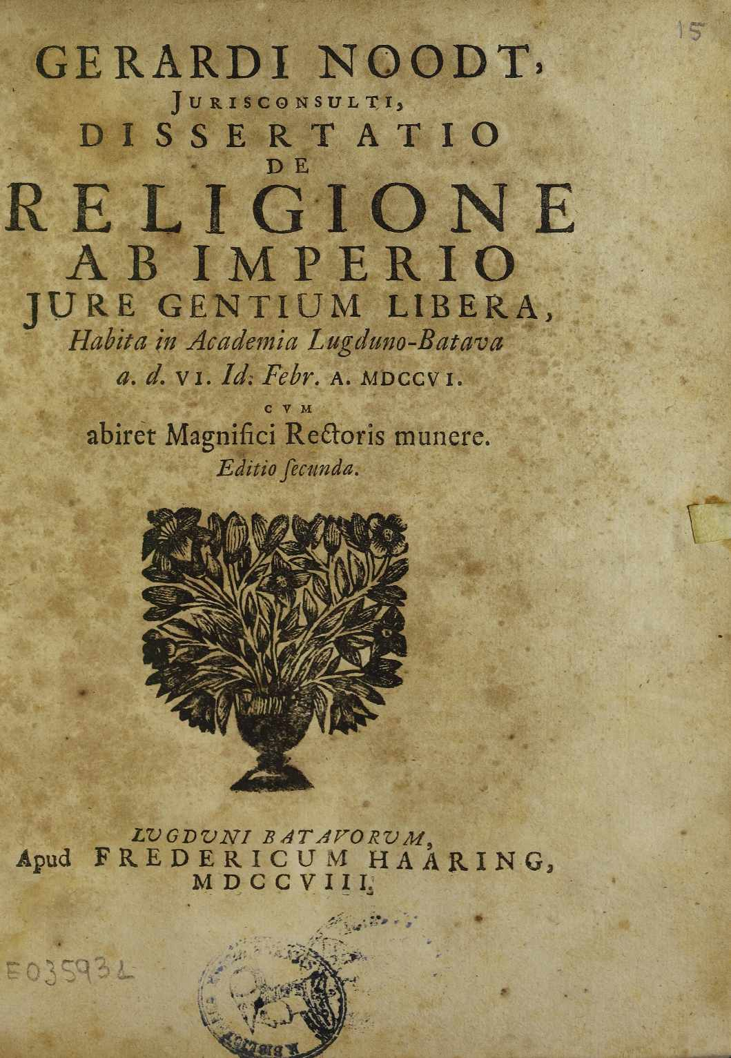 Frontespizio